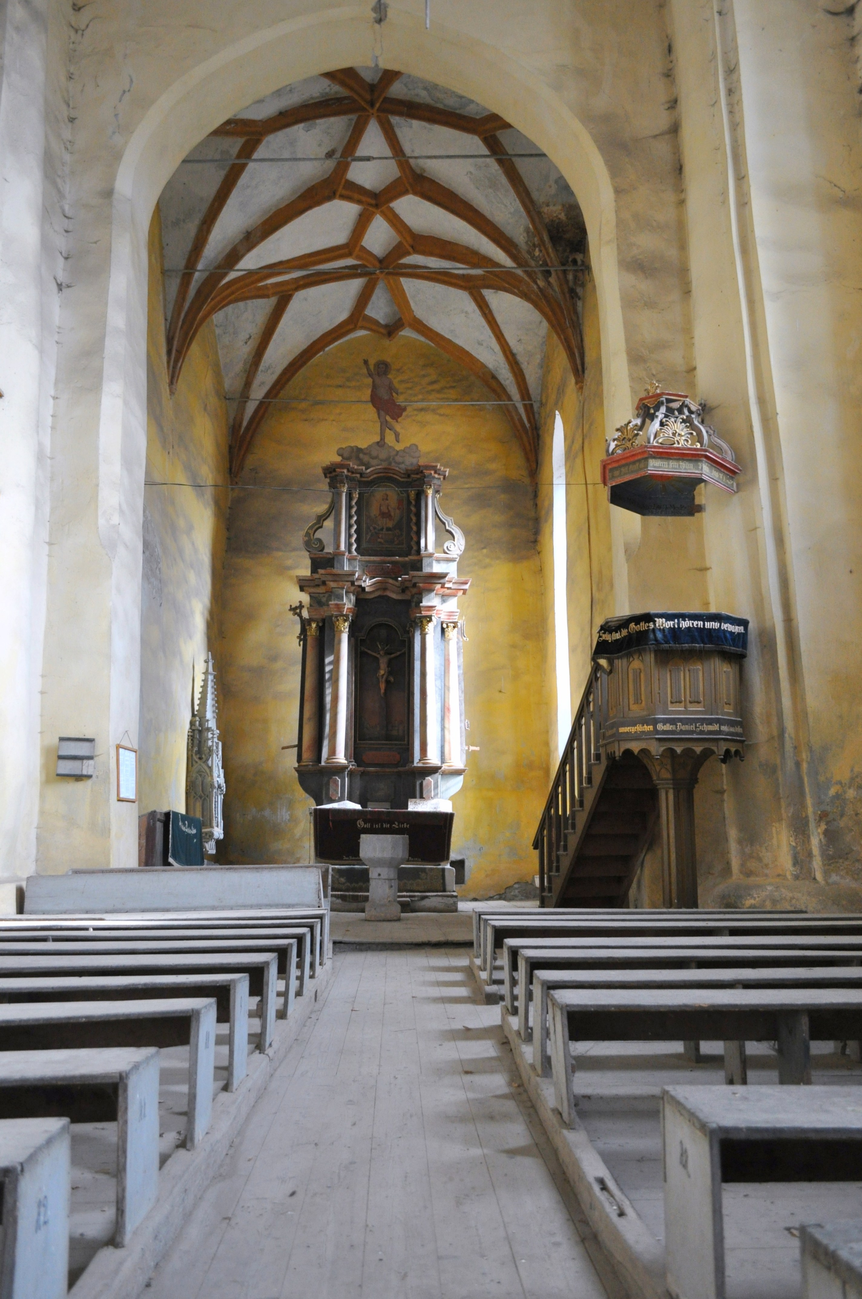 Biserica evanghelică fortificată din Boian, județul Sibiu